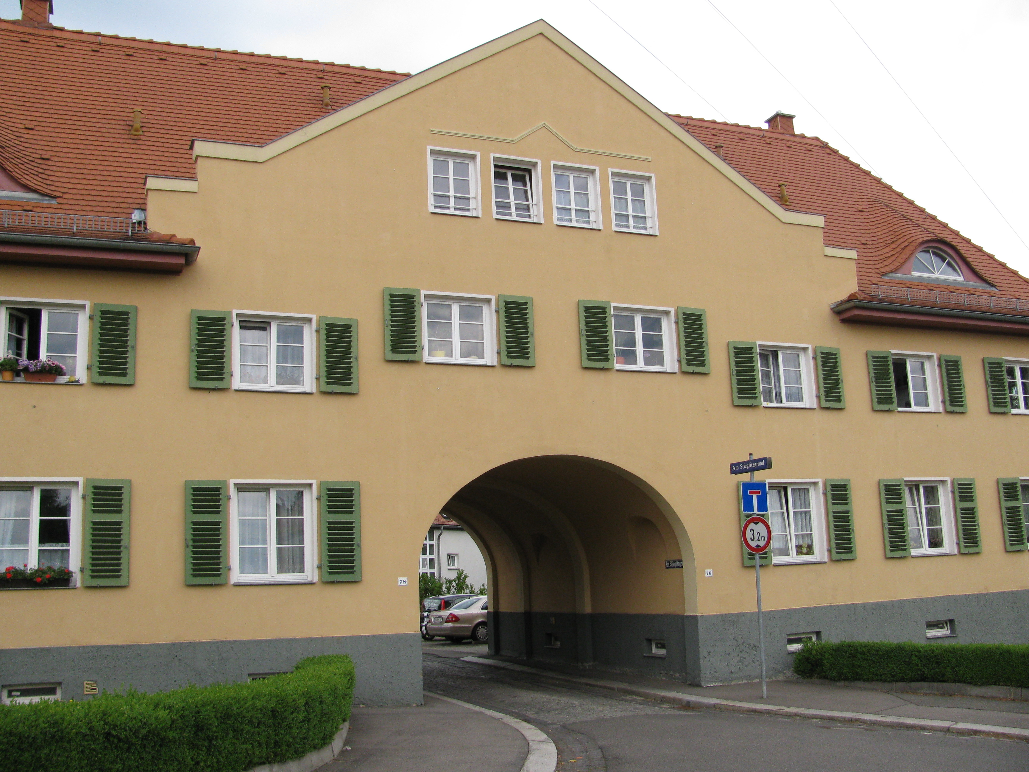 Gebäude Am Stieglitzgrund in Wölfnitz, Stadtteil von Dresden